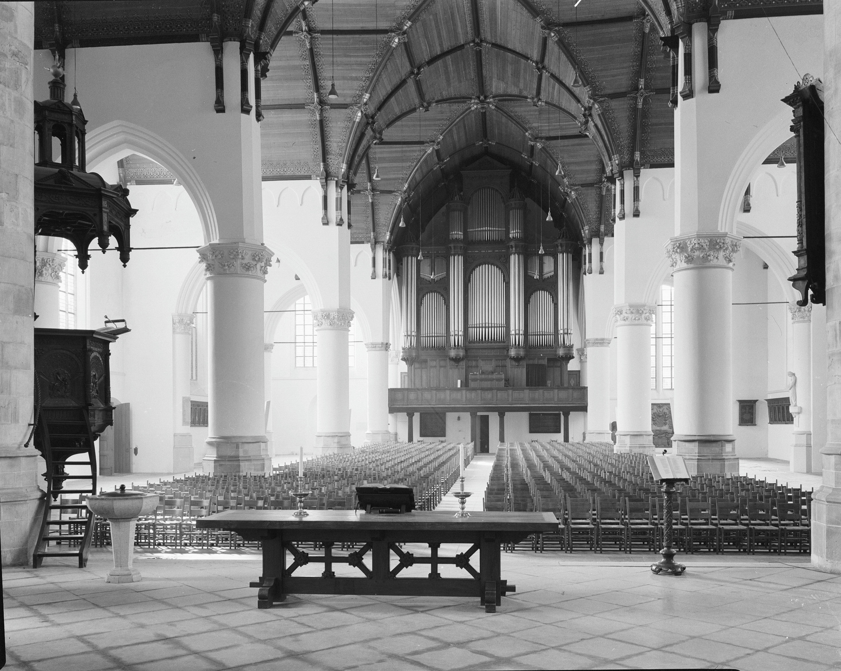 Sint Jacobskerk: interieur naar het westen